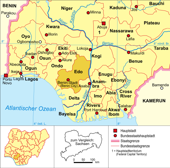 Politische Karte Nigerias (Bundesstaat Edo hervorgehoben)